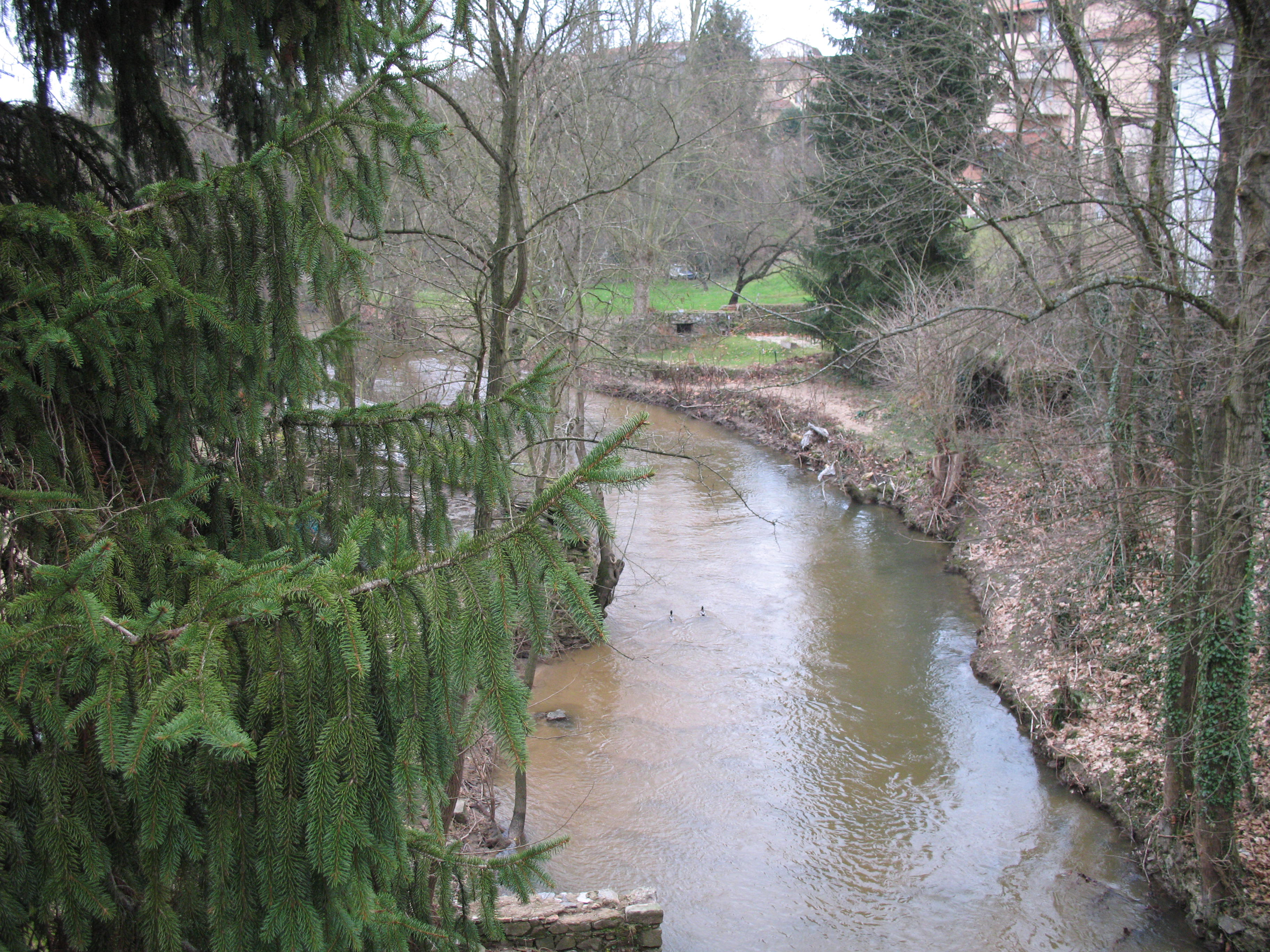 L'Yseron, rivière, à Francheville dans le Rhône.